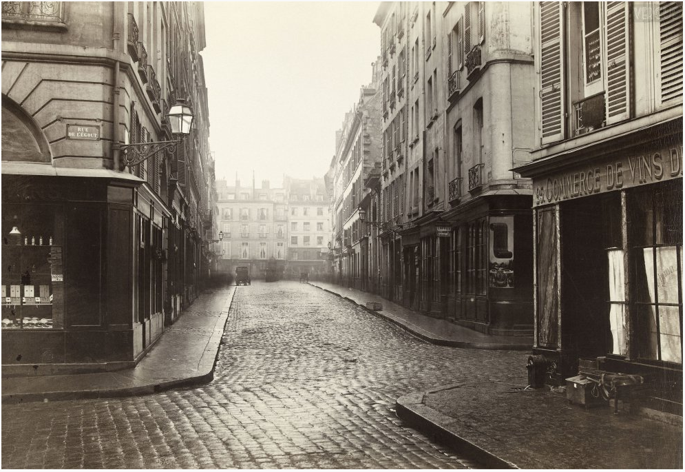 Rue Taranne, du carrefour Saint Benoît. Paris VIe. Vers 1866, a photography by Charles Marville. Marville se trouve au carrefour Saint Benoît et photographie la rue Taranne. À gauche, nous voyons le débouché de la rue de l’Égout et à droite, celui de la rue Saint Benoît. Au fond, les maisons et l’édicule de station de voitures de place sont sur la rue des Saint Pères. Le carrefour Saint Benoît et la rue de l’Égout vont disparaître en 1867, lors du prolongement de la rue de Rennes. À cette occasion, on démolit la première maison que l’ont voit à gauche (numérotée 1, rue Taranne et 2, rue de l’Égout), qui fut celle de Denis Diderot de 1754 à 1784, ainsi que la première maison à droite, portant le no 25, rue Saint Benoît.